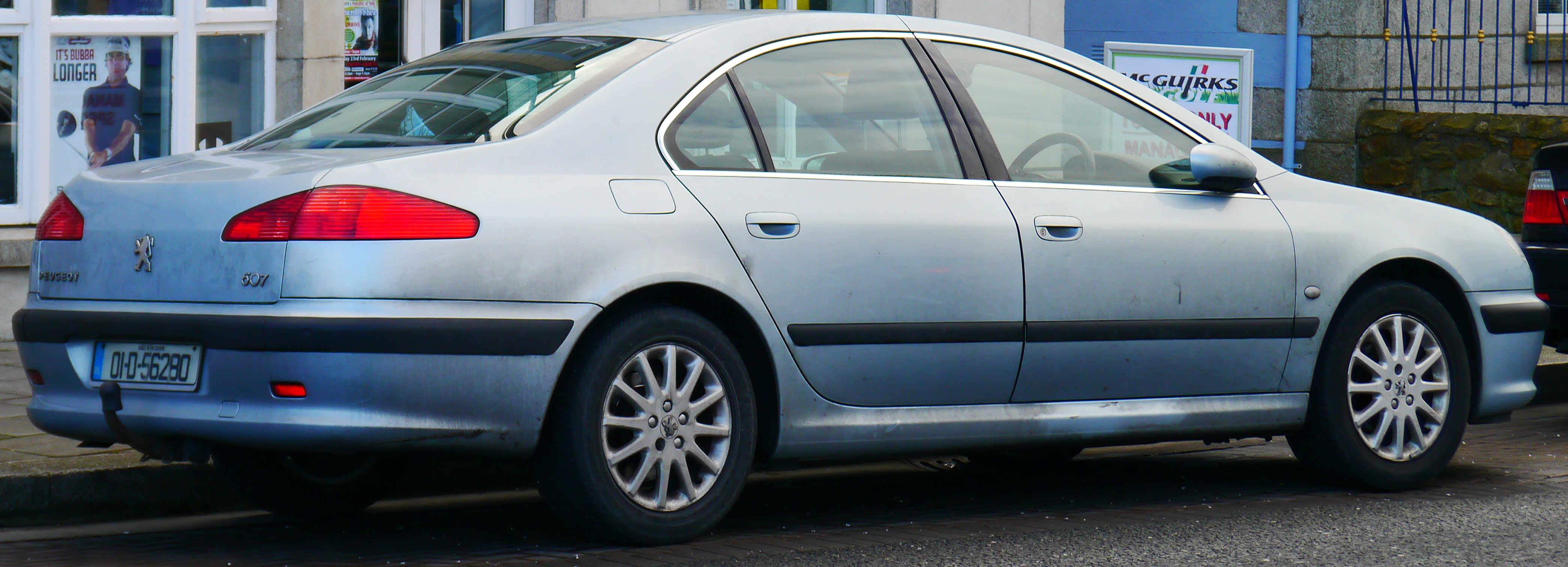 2001 Peugeot 607 SE 2.0 HDI. 4-cylinder 1997 cc engine (81 kW; 108 hp).